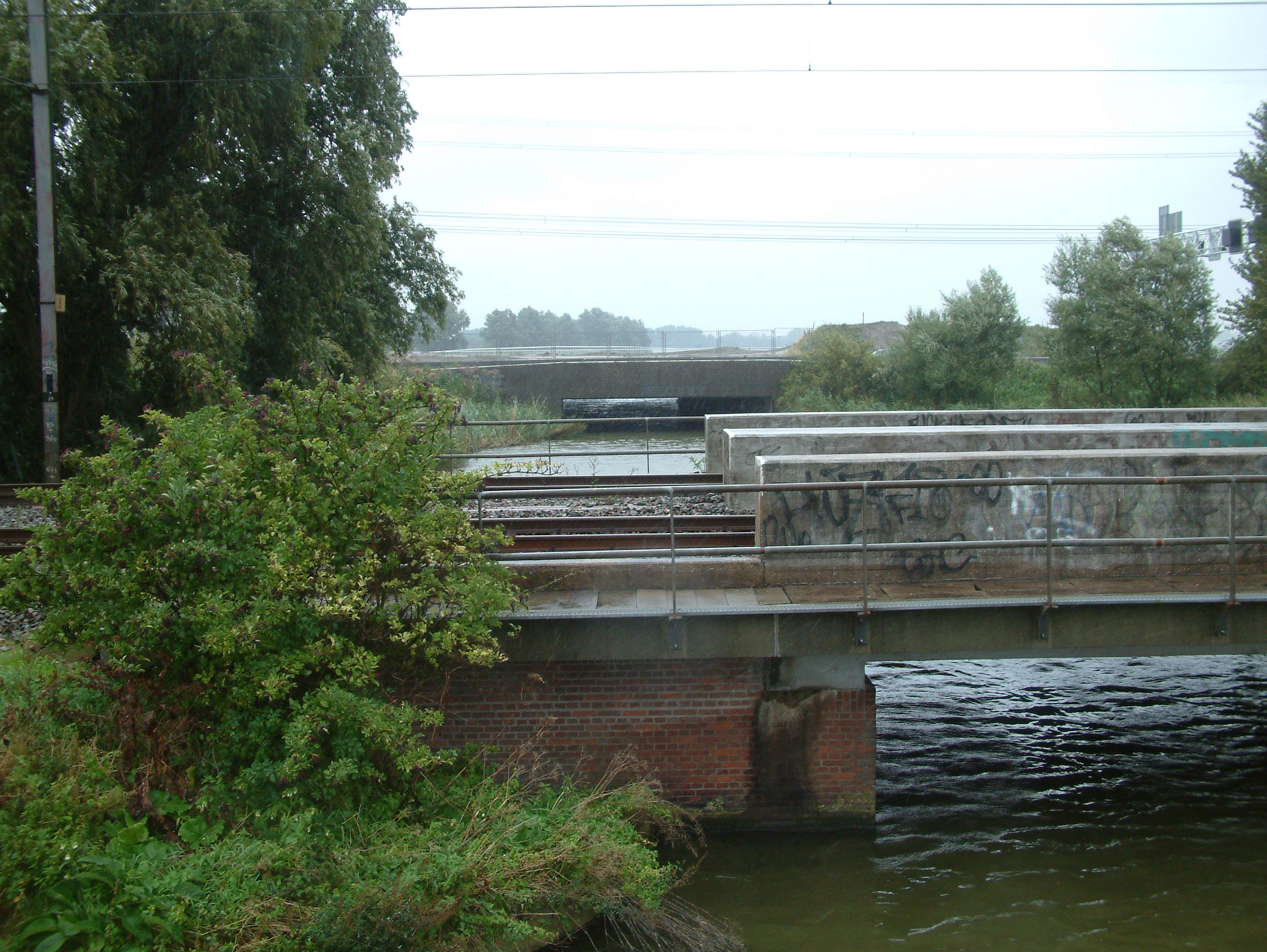 Brig in de A12 en de spoorbrug over de Rotte